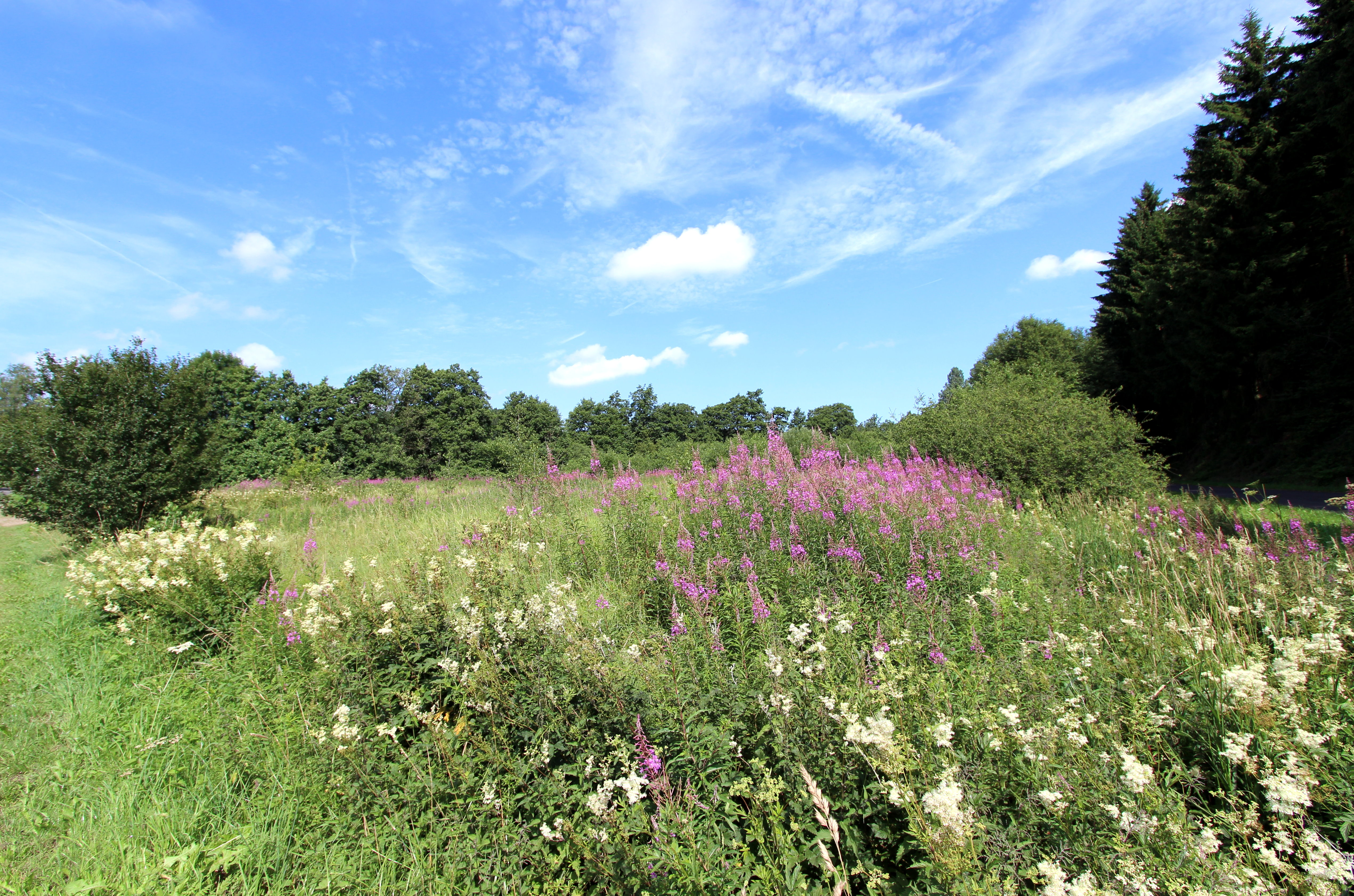 54597 Neuendorf, zwischen Neuendorf und Grillhütte. Aufnahme von 2017.